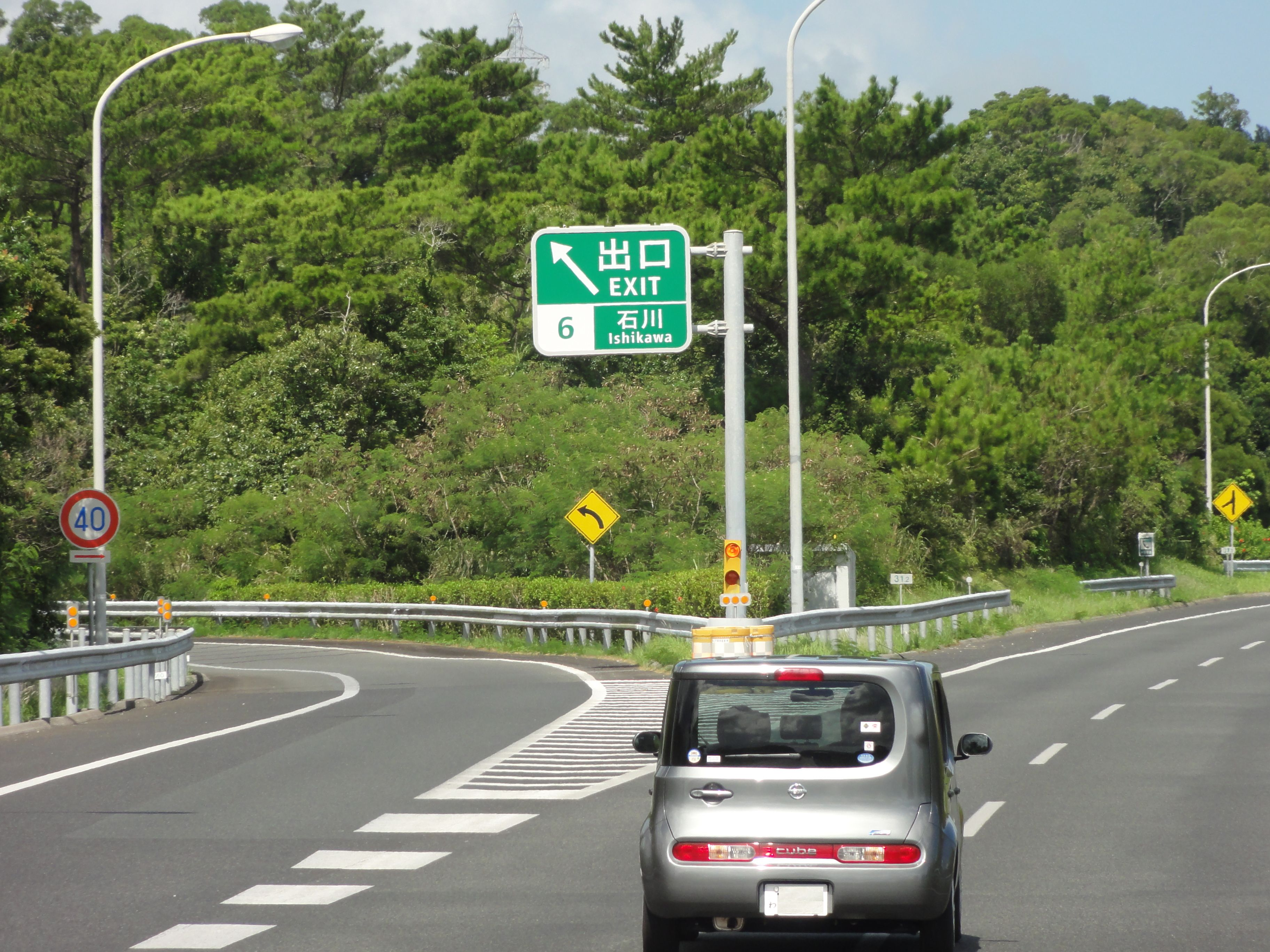 石川インターチェンジ